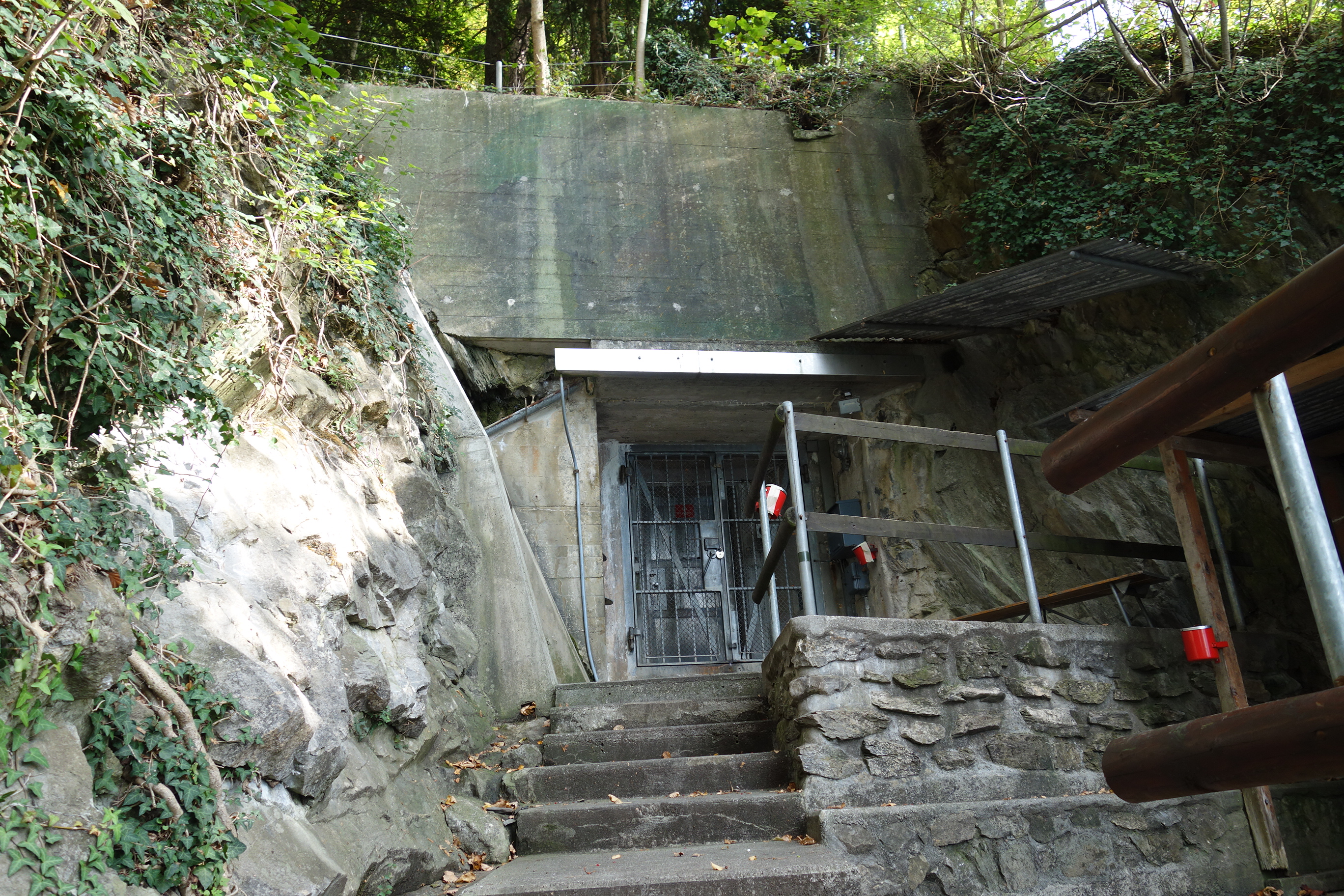 Artilleriewerk Ober Nas, Vitznau LU, Schweiz